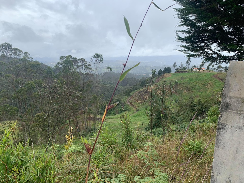 Sendero Camino al Cielo, desde sus alturas se puede divisar las calles que conducen al sendero.